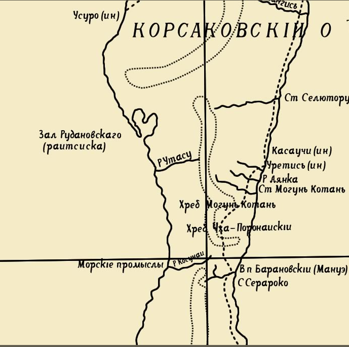 фрагмент административной карты о. Сахалин, 1890 г. (район современного Красногорска).